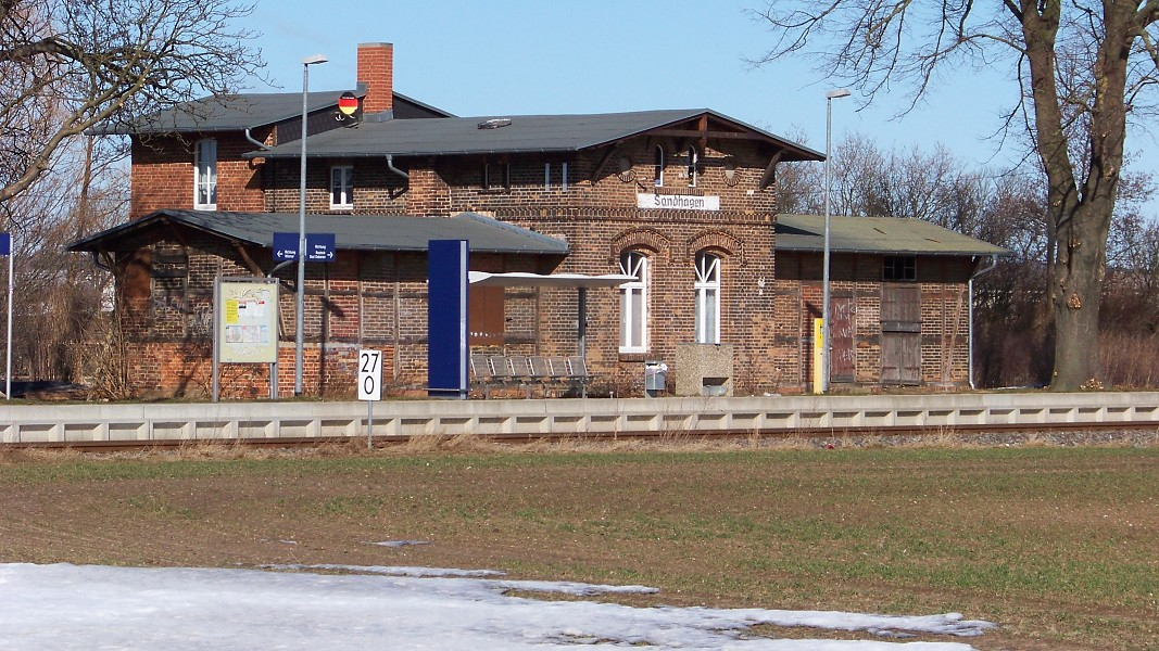 Bahnhof Sandhagen